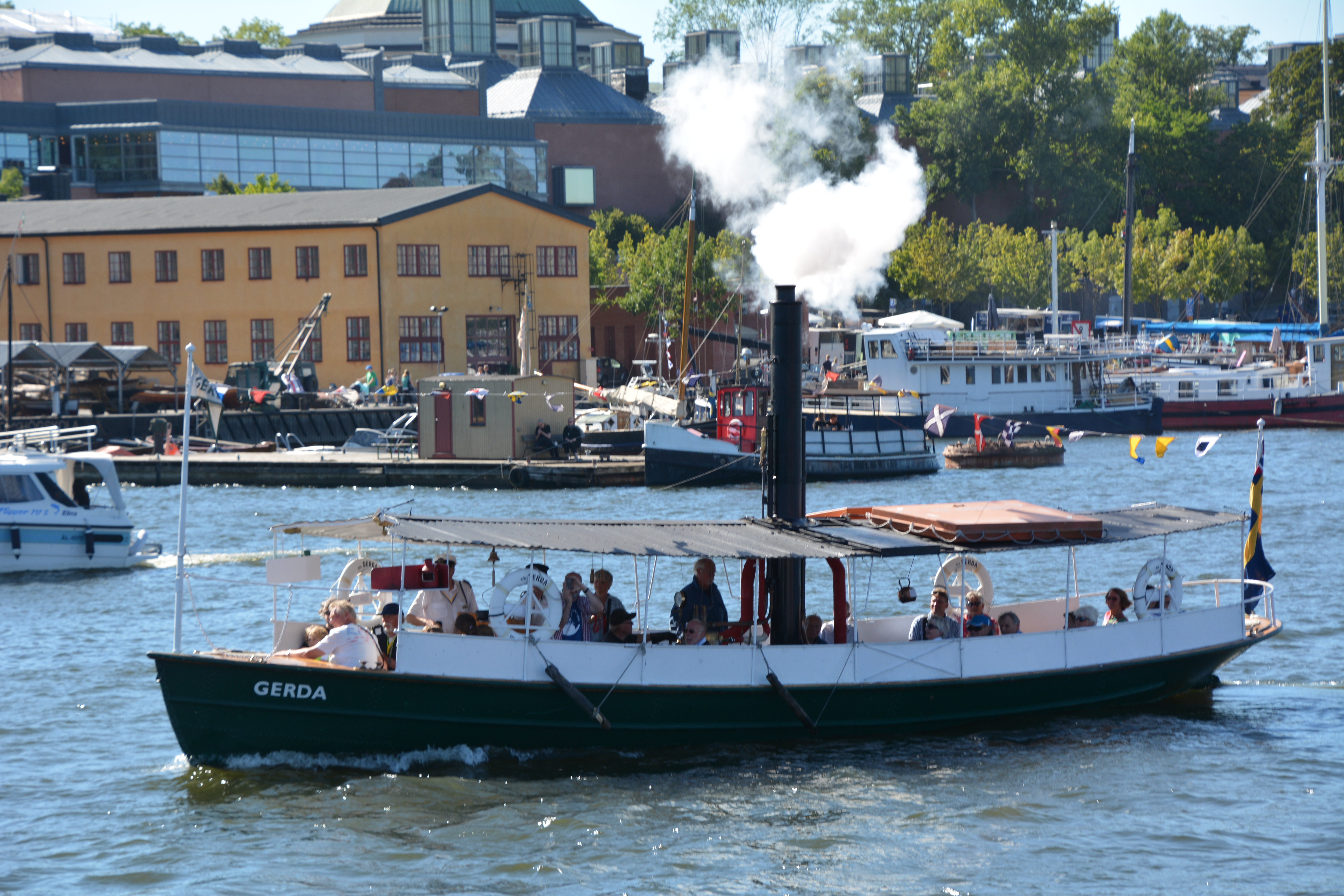 Ångslupen Gerda under Stockholm Steam 2015 This is an image of the protected Swedish ship Gerda, with call sign SFC 4960 .